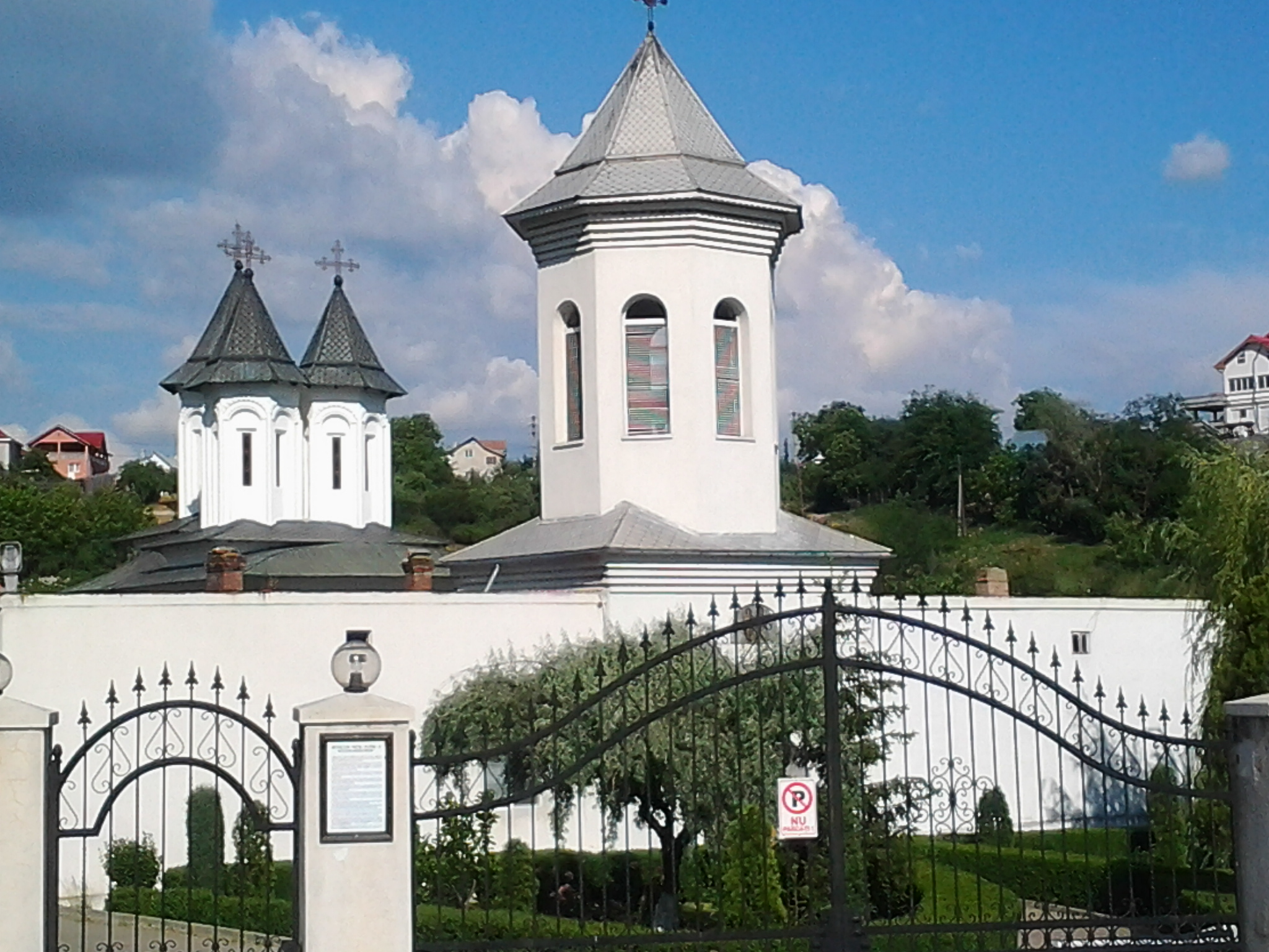 Mănăstirea Clocociov 04